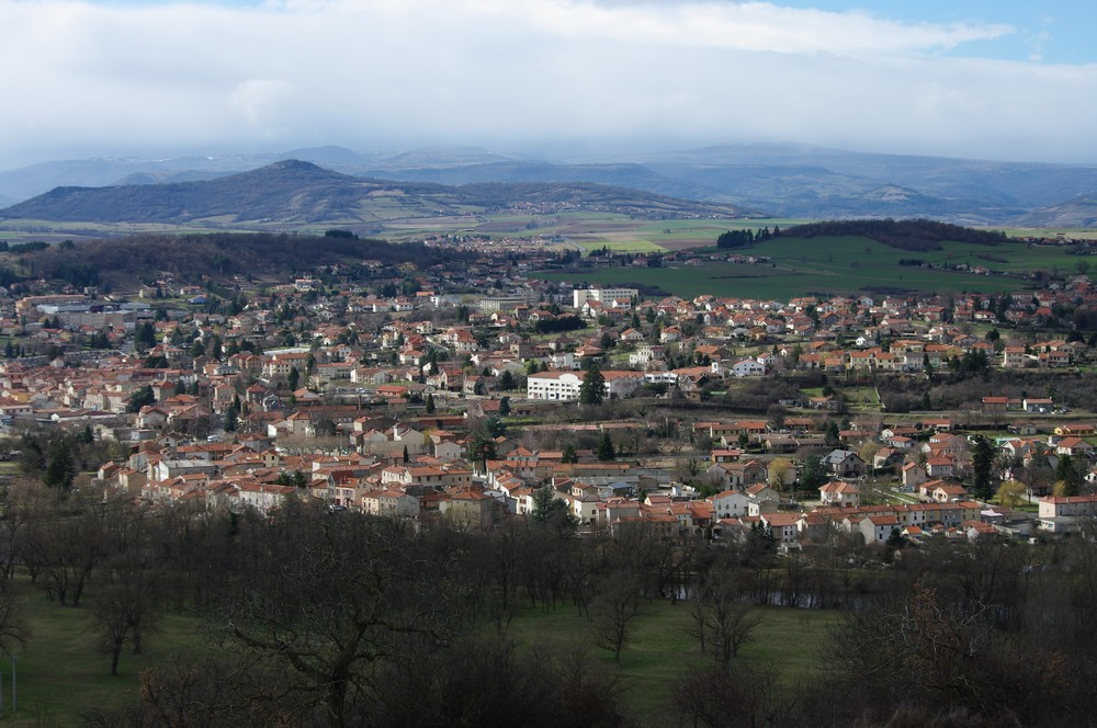 Vue de Brassac-les-Mines (63) depuis le village de Marnat.